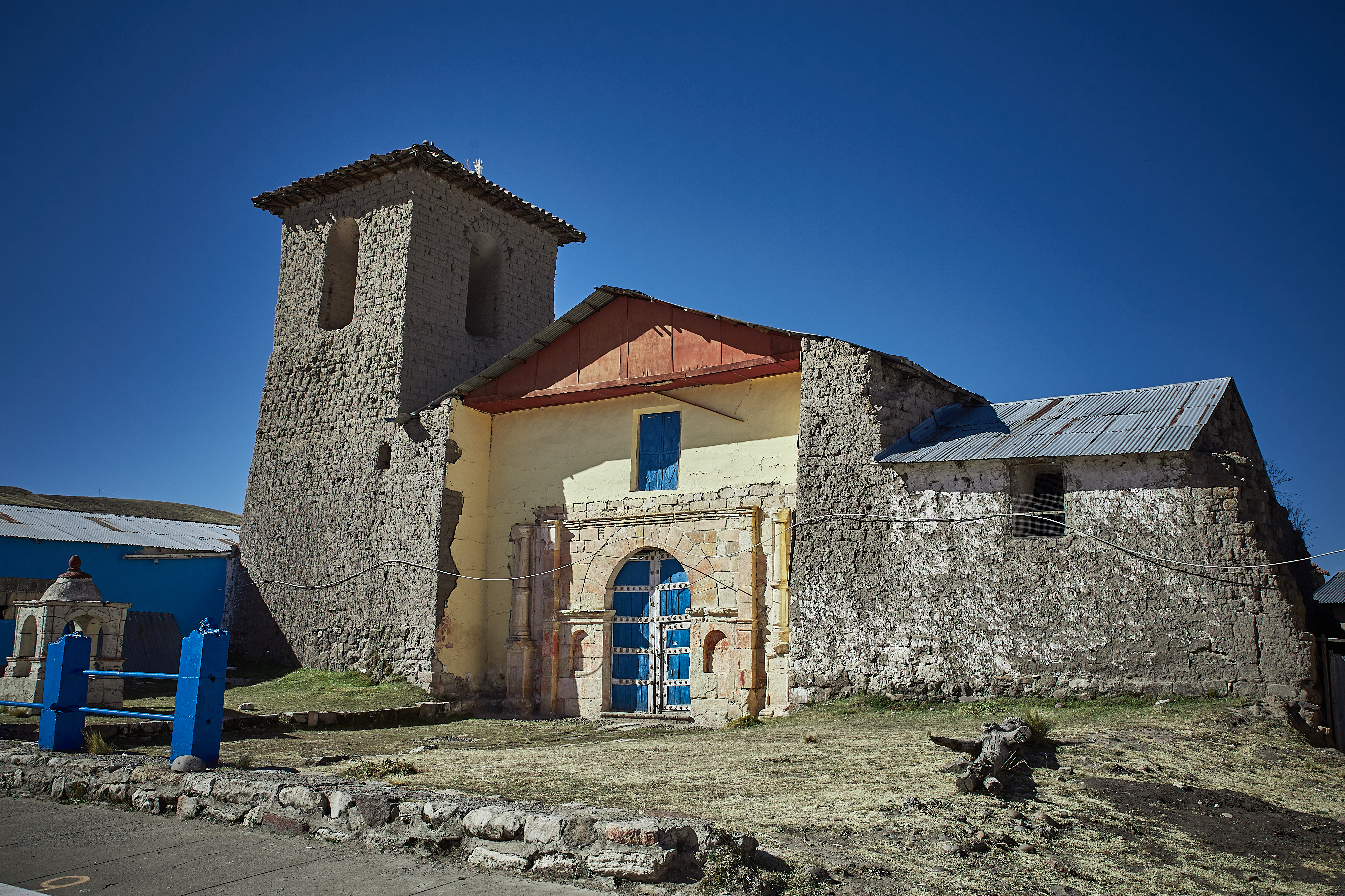 Templo de Santa Lucía de Pichigua, atrio frontal y espacios laterales y posterior que lo rodean